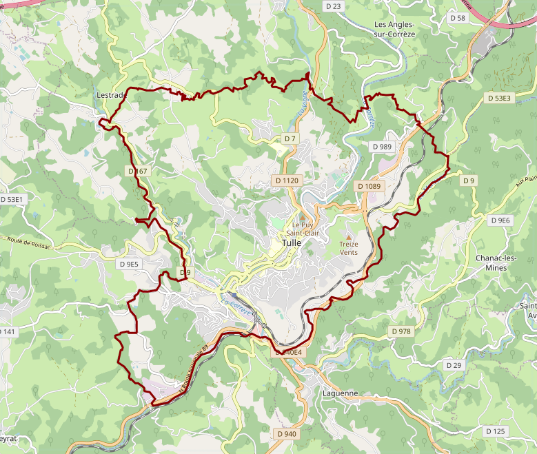 carte réalisée sur umap This map may be incomplete, and may contain errors. Don't rely solely on it for navigation.